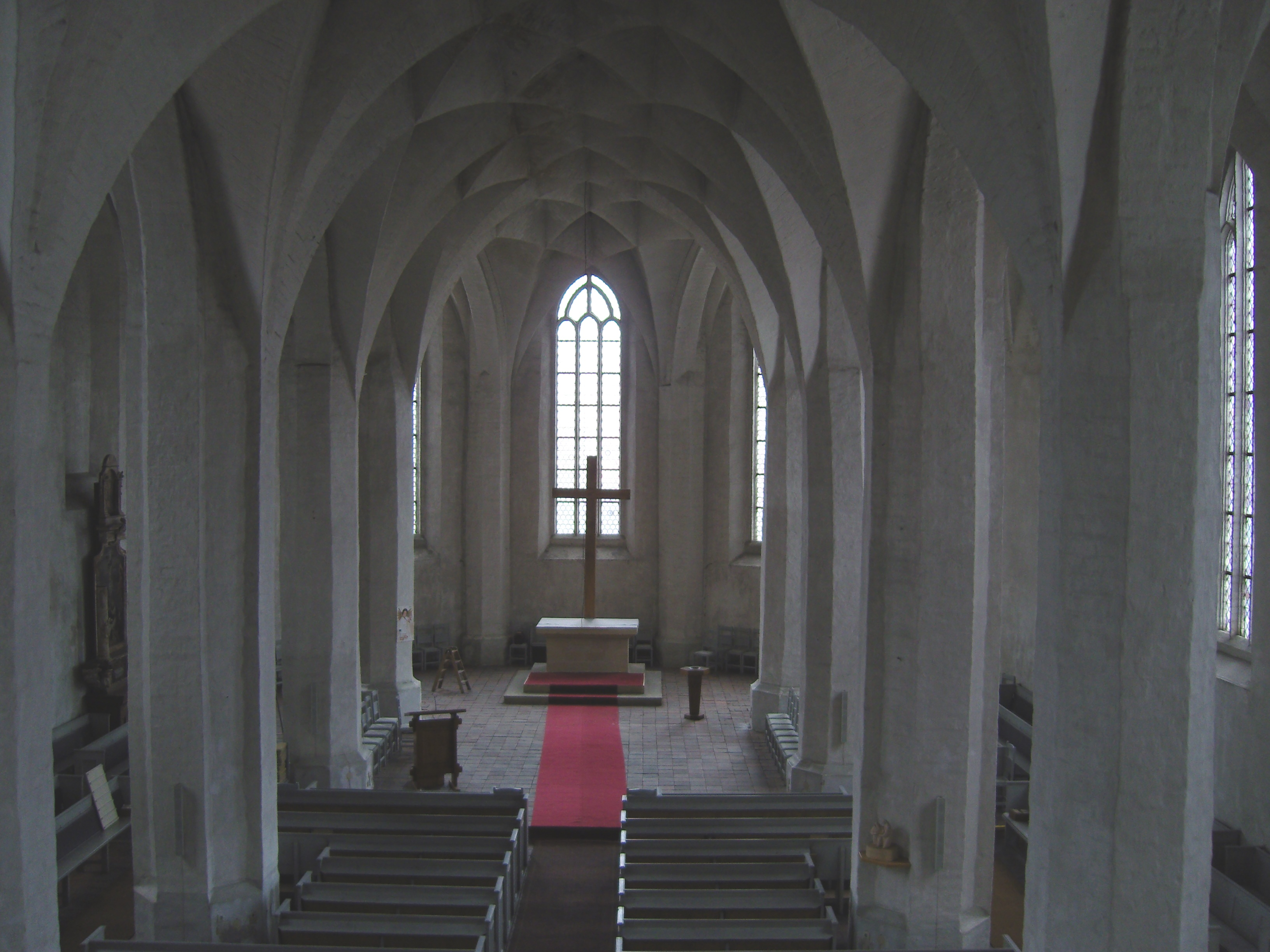 Innenraum der Senftenberger Peter-und-Paul-Kirche von der Empore aus aufgenommen